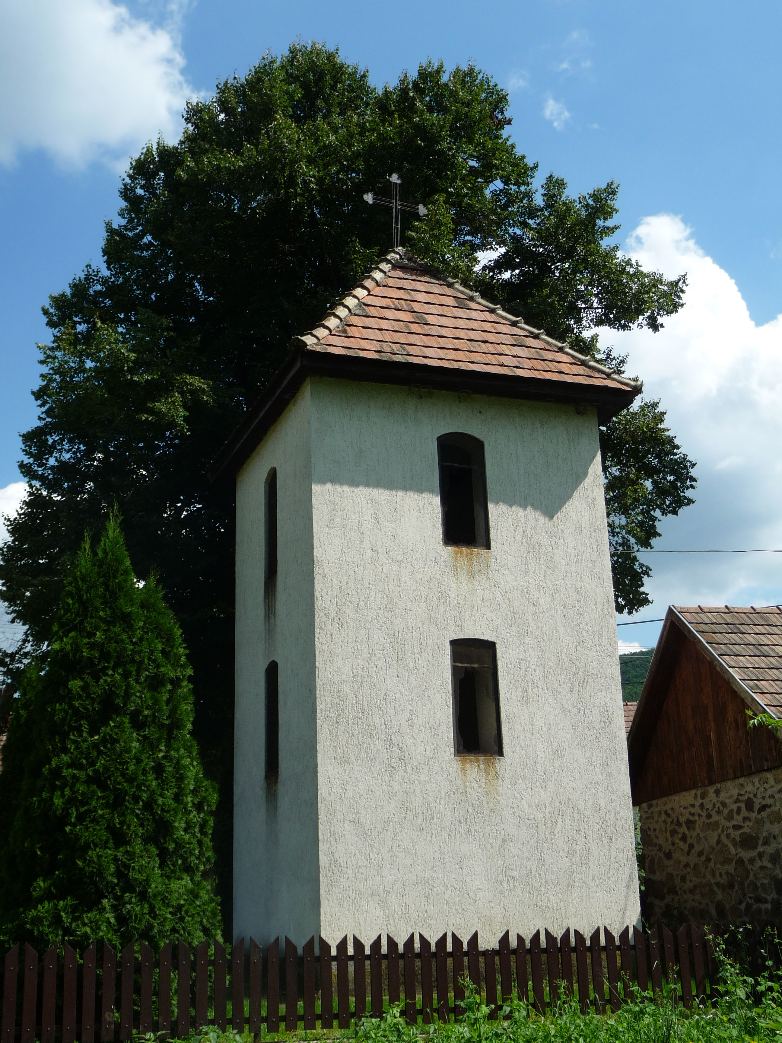 Felsőtoldi harangtorony